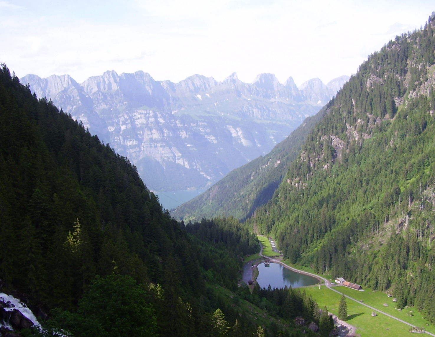 Blick vom Weg zwischen Mürtschental und Merlen (Murgtal); die Gebirskette im Hintergrund ist jene nördlich des Walensees.